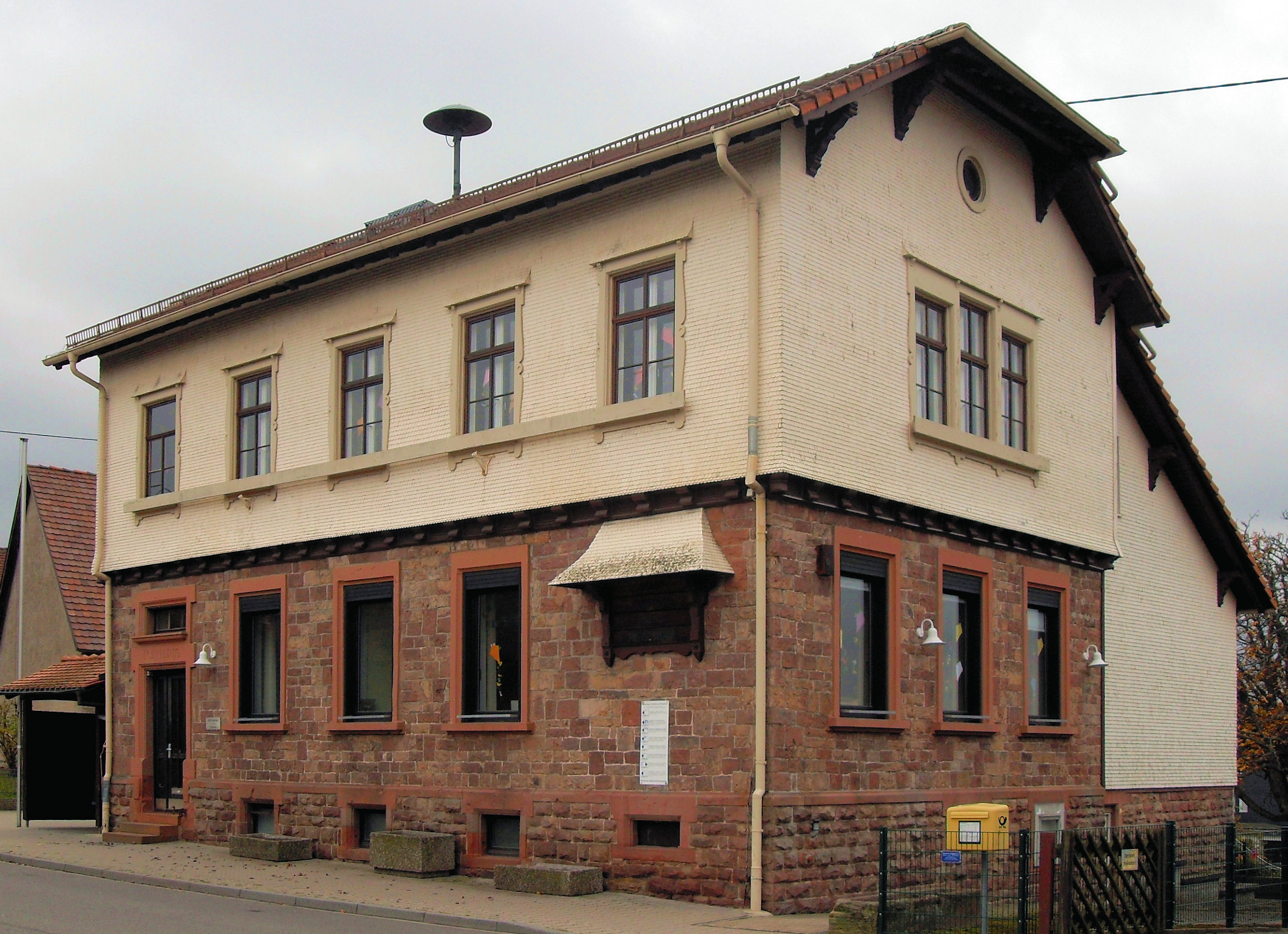 ehemaliges Rathaus von Freiolsheim, seit 1971 Ortsteil der Stadt Gaggenau, Landkreis Rastatt